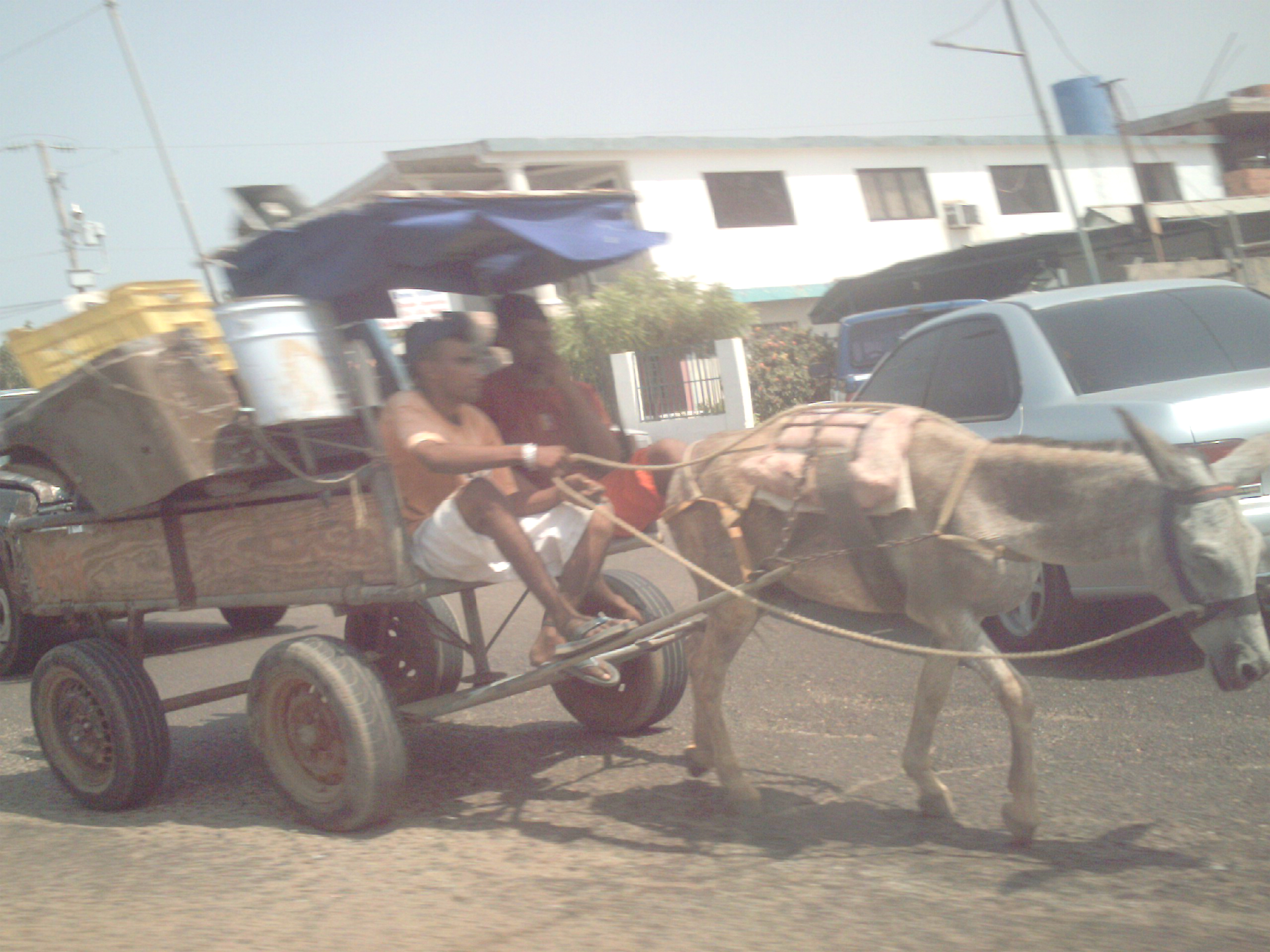 Transporte comúnmente usado en Maracaibo.